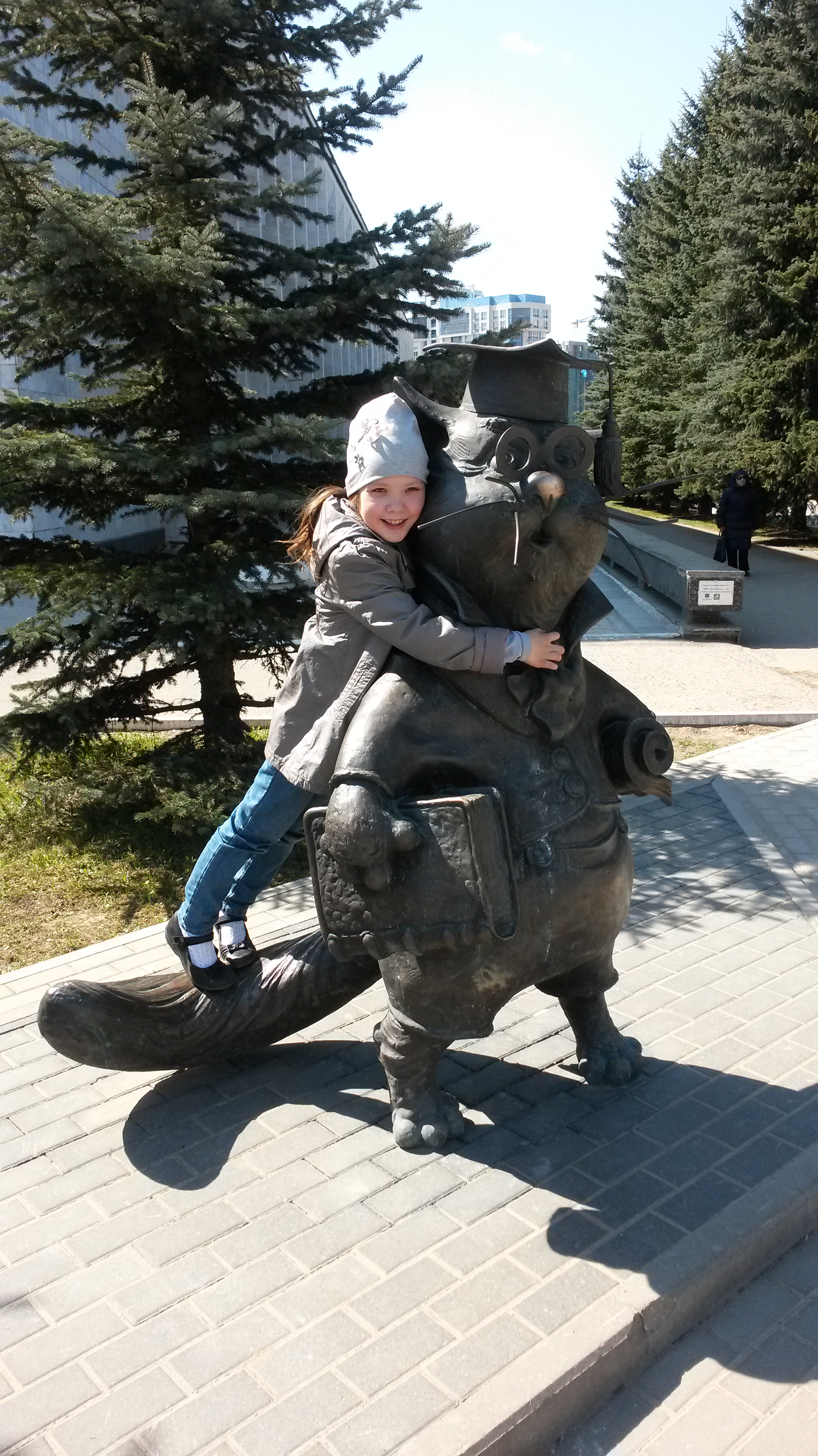 Скульптура "Кот учёный" в Обнинске